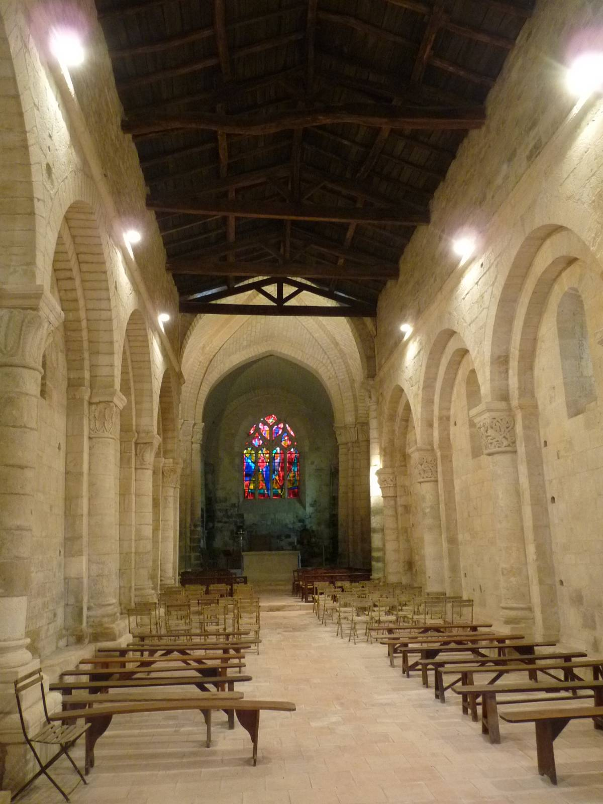 église de Macqueville, Charente-Maritime, France